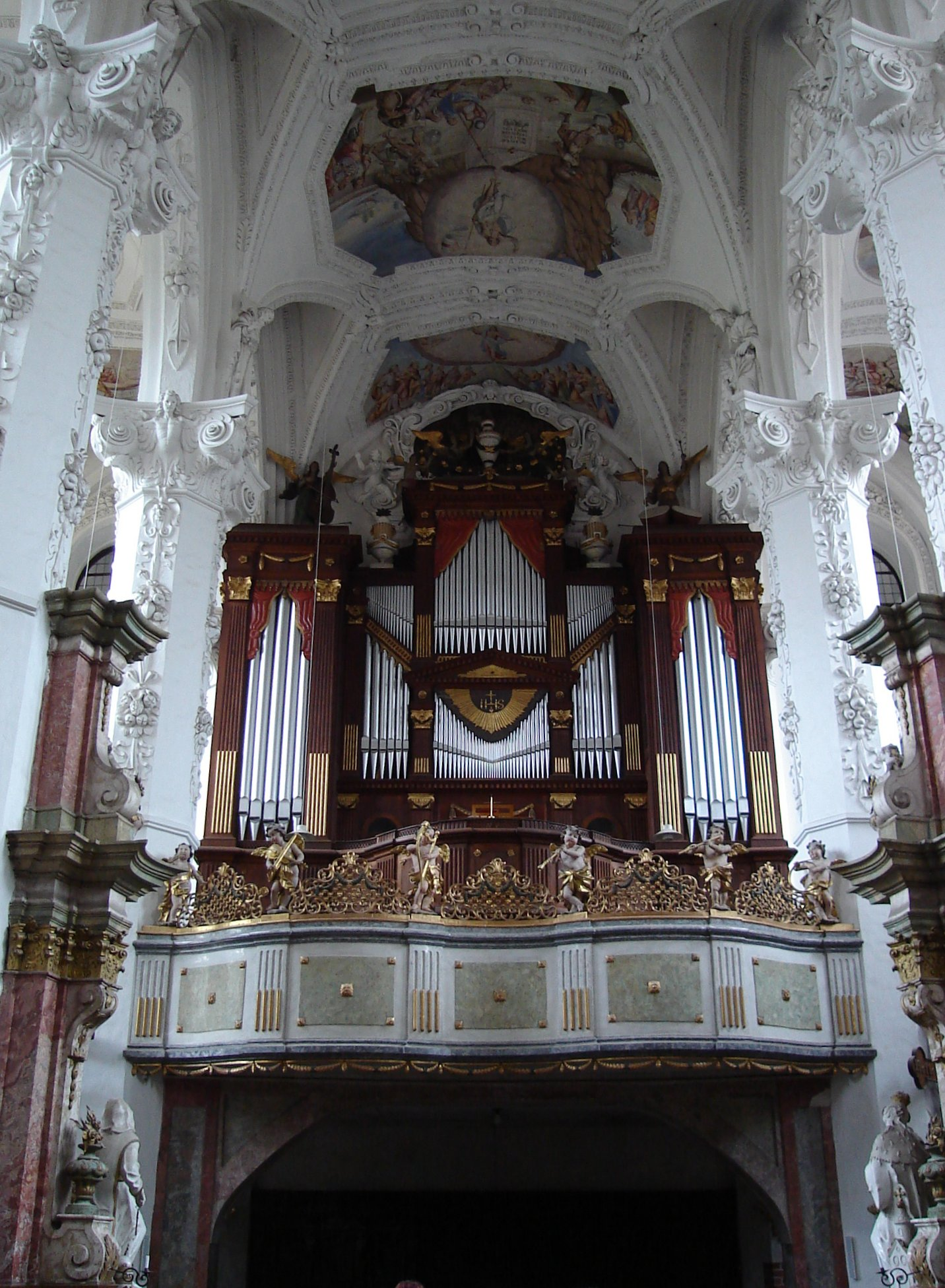 Kloster Neuzelle in Brandenburg, Orgel photo taken on July 9, 2005